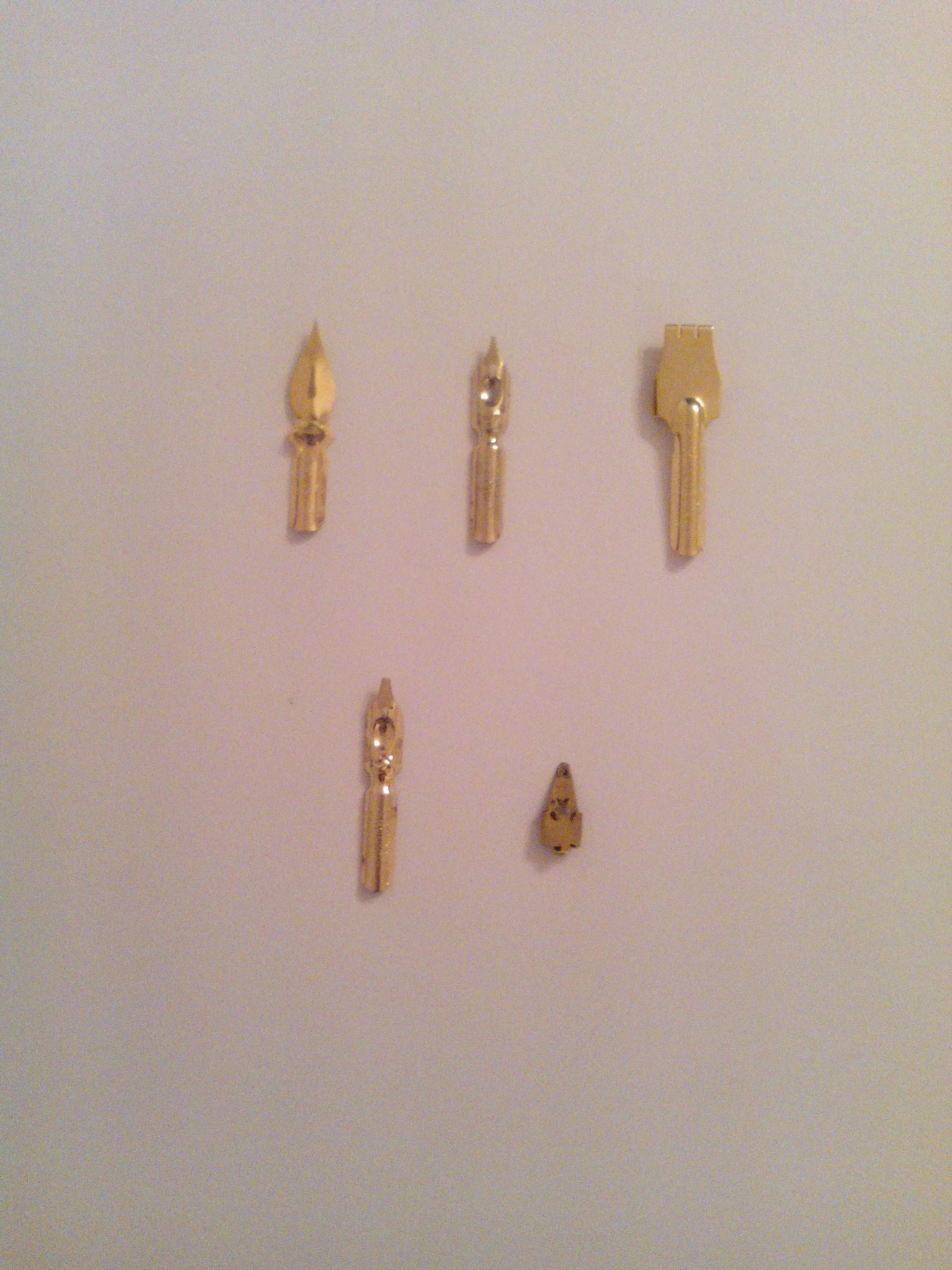 Srpski (latinica): Spicasto i ravno pero.